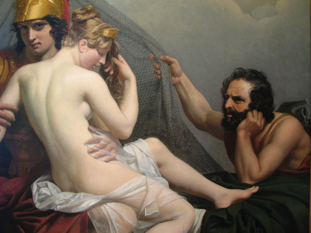 Wenus i Mars przyłapani przez Wulkana